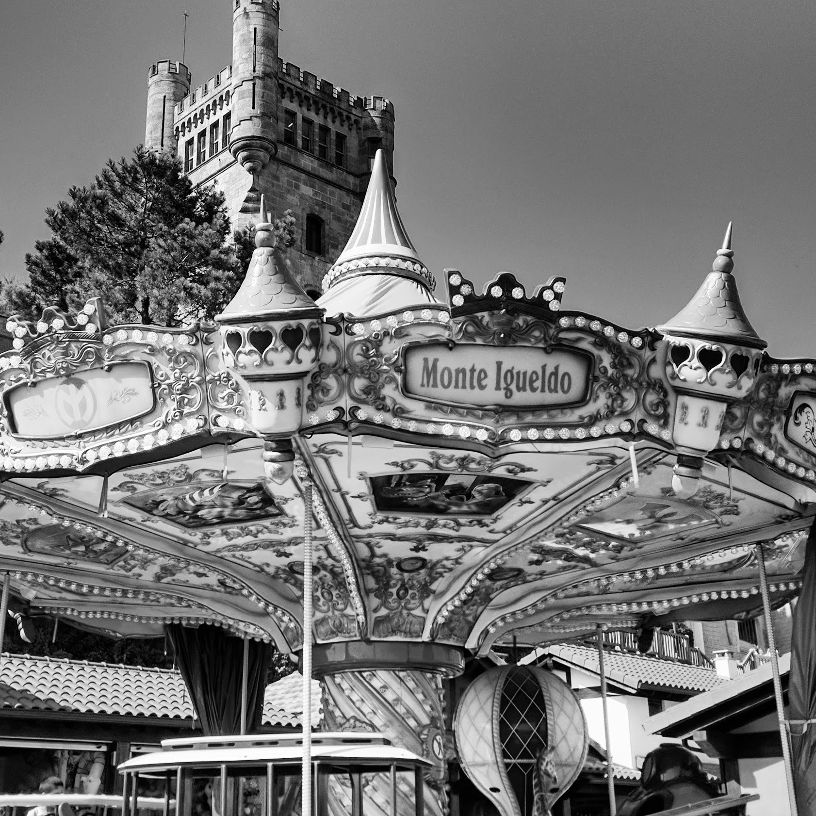 Igeldo mendiko jolas parkea (Donostia). Zuri beltzezko irudia. (2017)